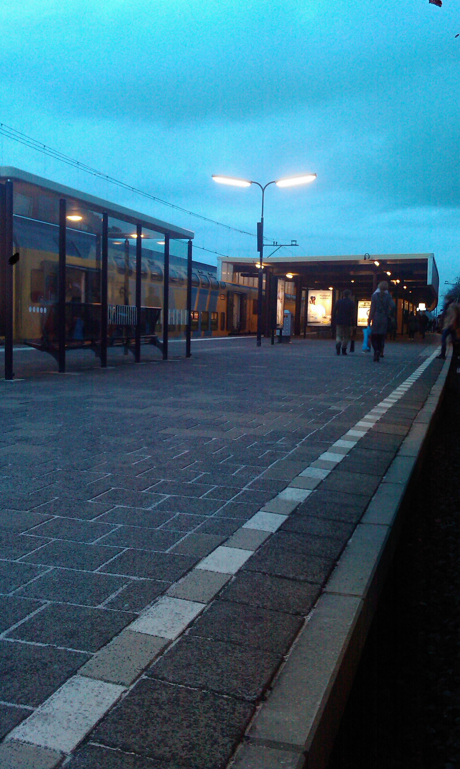 Eilandperron van Station Heiloo. Aan overzijde een dubbeldeksaggloregiomaterieel afkomstig uit Hoorn met eindbestemming Haarlem.